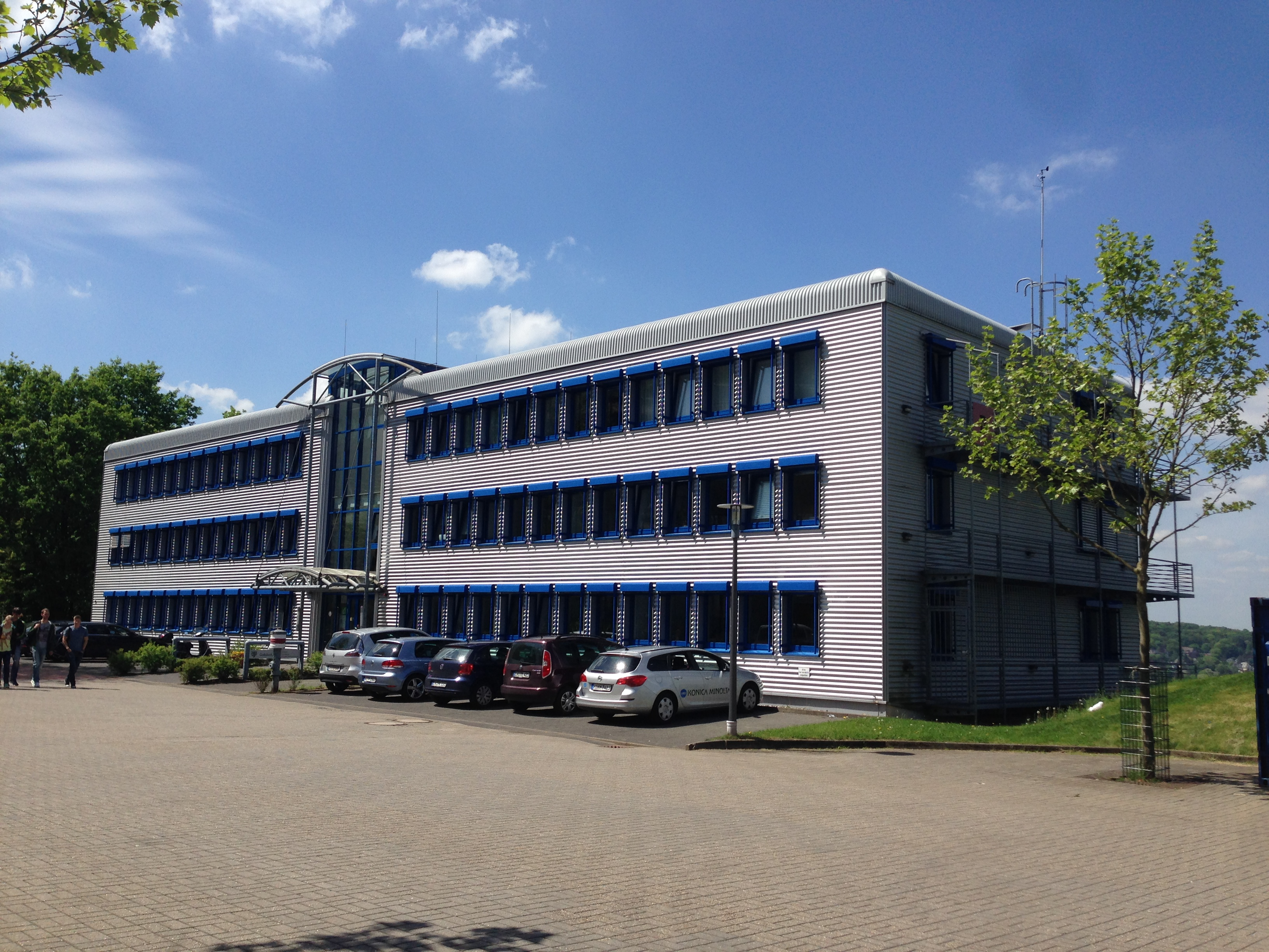 Gebäude B (Verwaltung) der Bergischen Universität, von Süden